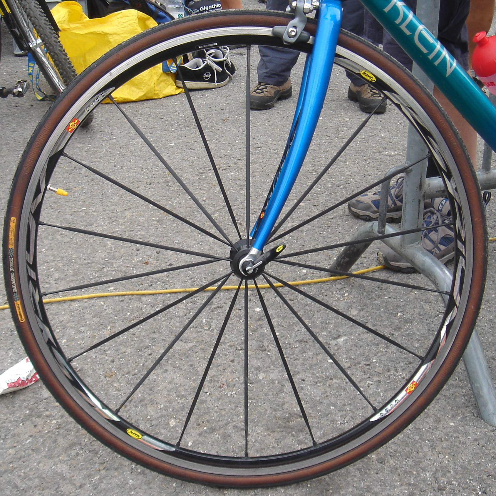 Roue avant de vélo de course. Gulong ng isang bisikleta.